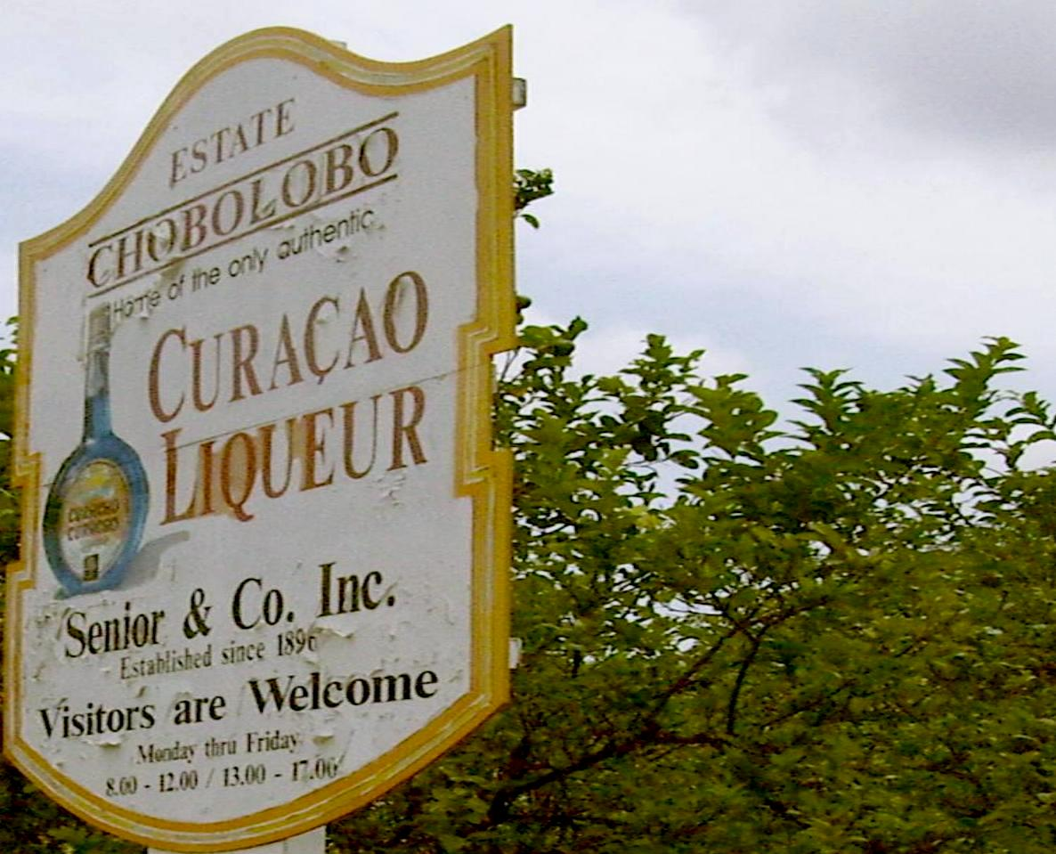 Curacao Liqueur. Eine Infotafel vor der historischen Likör-Brennerei. Fotografiert 2006